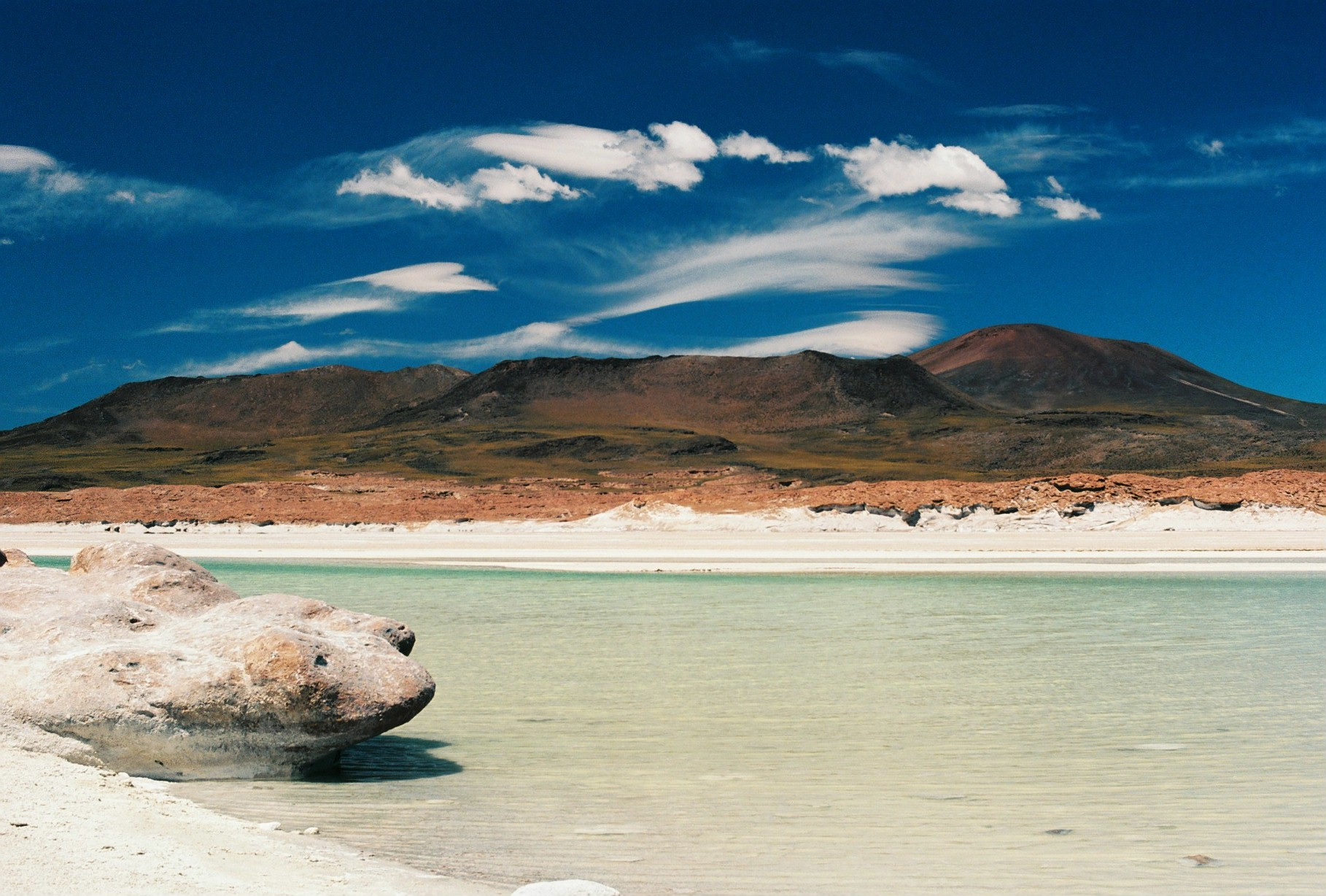 Piedras rojas. La abundancia de tonalidades de las formaciones rocosas y de las lagunas se debe a una variedad de minerales de la zona. Localizada en la cercanía de la reserva nacional Los Flamencos. Fotografía realizada en película de 35 mm Kodak Ektar 100